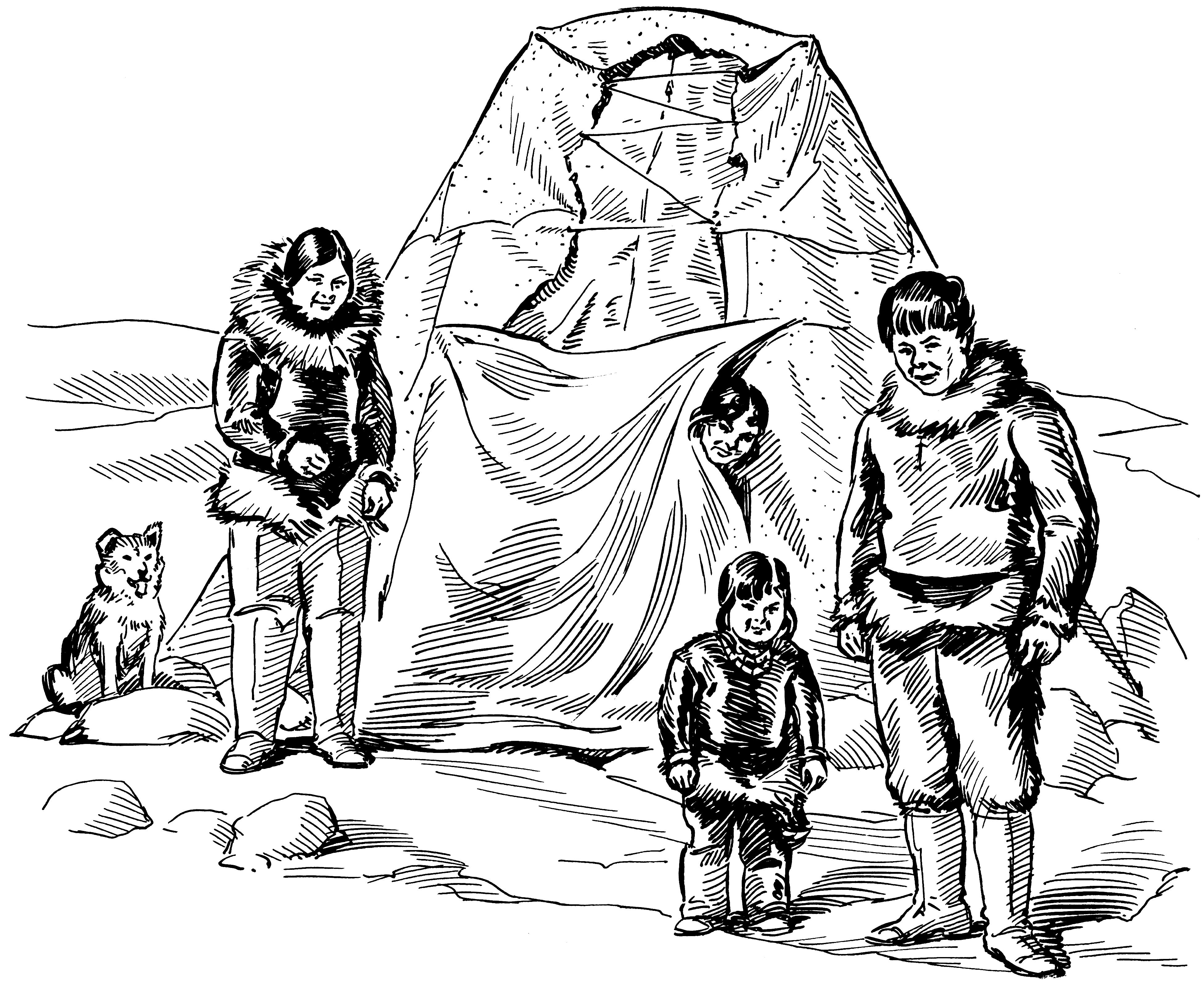 Eskimo